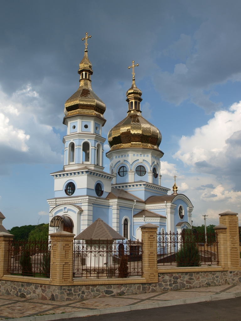 Полтава, с.Горбанівка, новий храм Різдва Богородиці